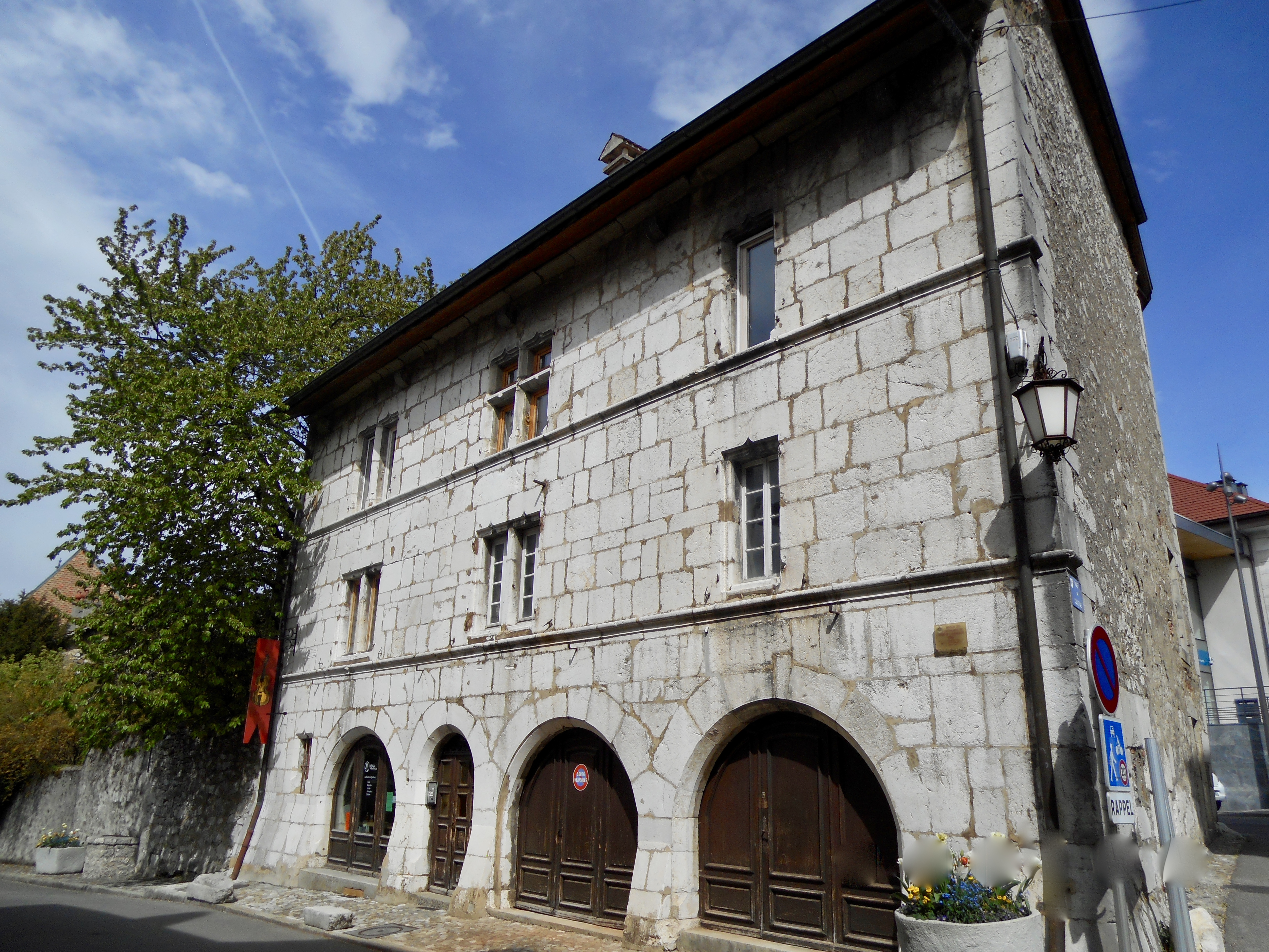 Maison des chevaliers de l'Ordre de l'Annonciade, construite en 1565 (inscription), La Roche-sur-Foron, printemps 2019.